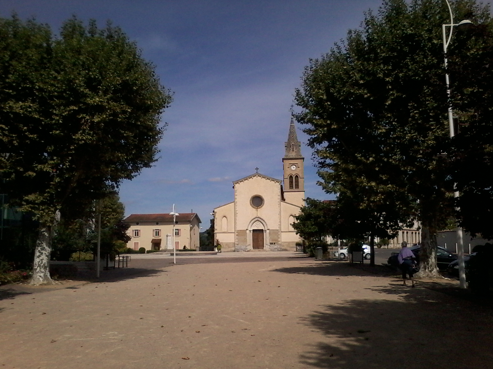 Place centrale de Pont-Evêque (Isère)